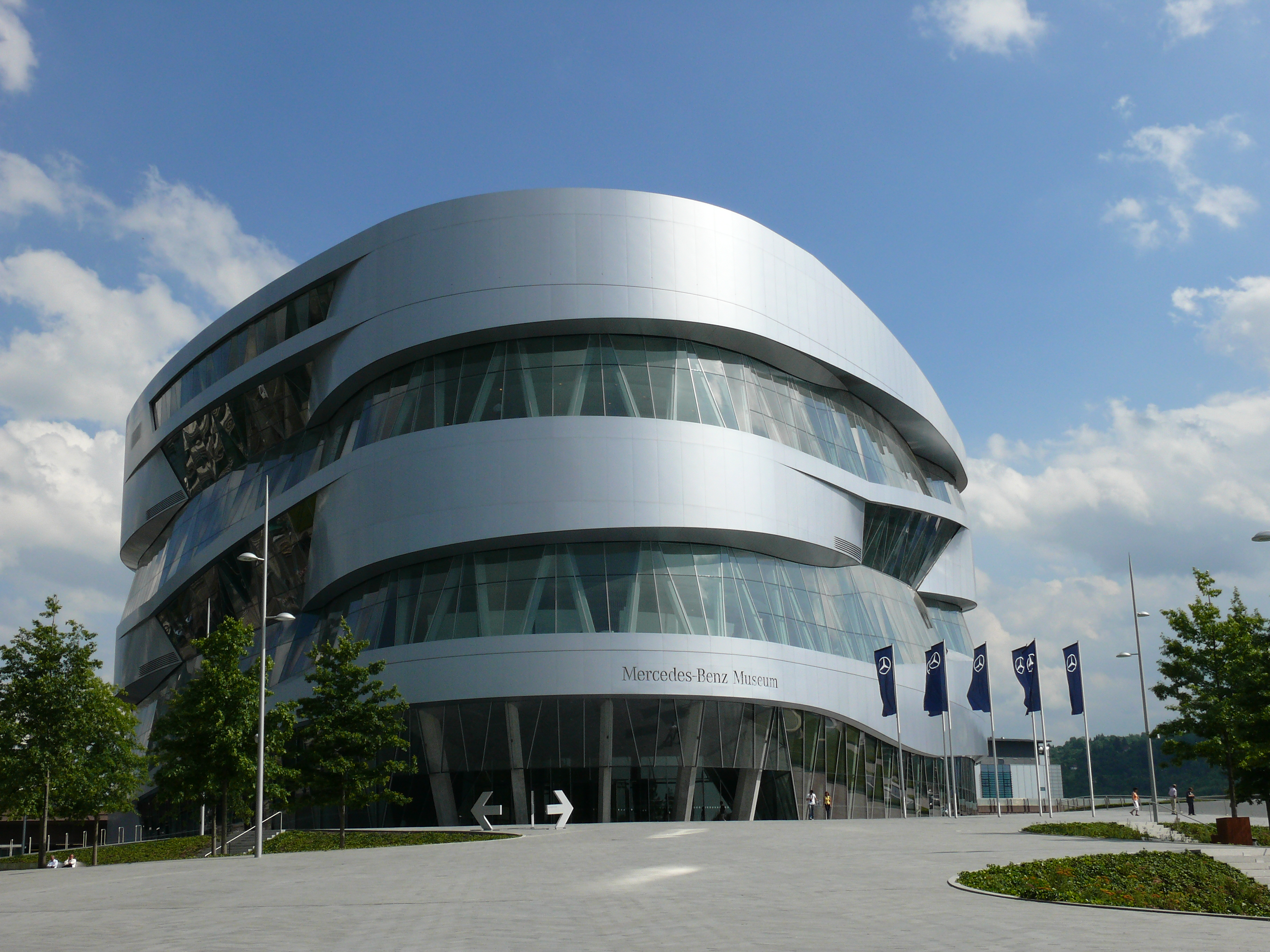 Das Mercedes-Benz-Museum im NeckarPark in Stuttgart.